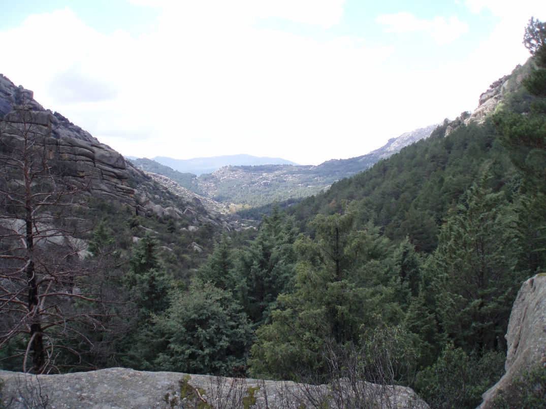 Valle de la Dehesilla, el cual divide la Pedriza Anterior y la Posterior (Comunidad de Madrid, España).